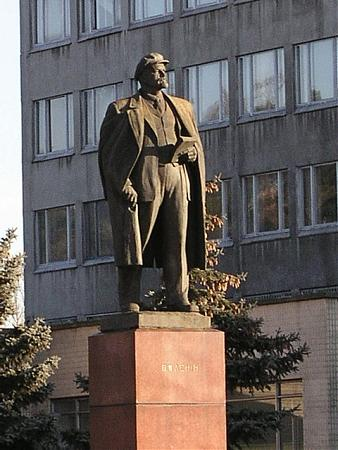 Пам'ятник Володимиру Леніну біля заводоуправління ДВРЗ у Дніпровському районі Києва (ск. С. С. Андрейченко, арх. І. Л. Масленков, 1959)